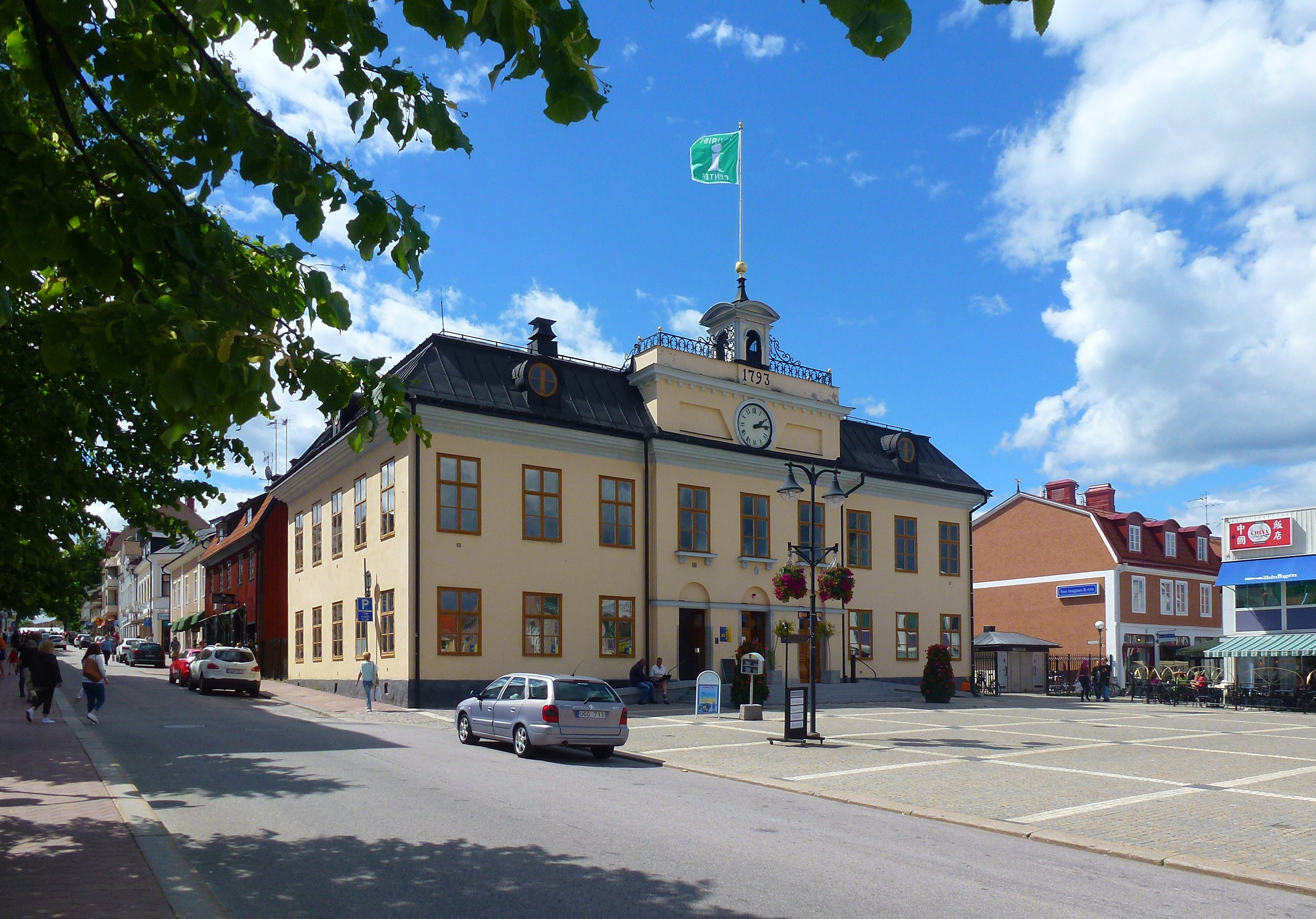 Västerviks gamla rådhus (nu turistinfo)